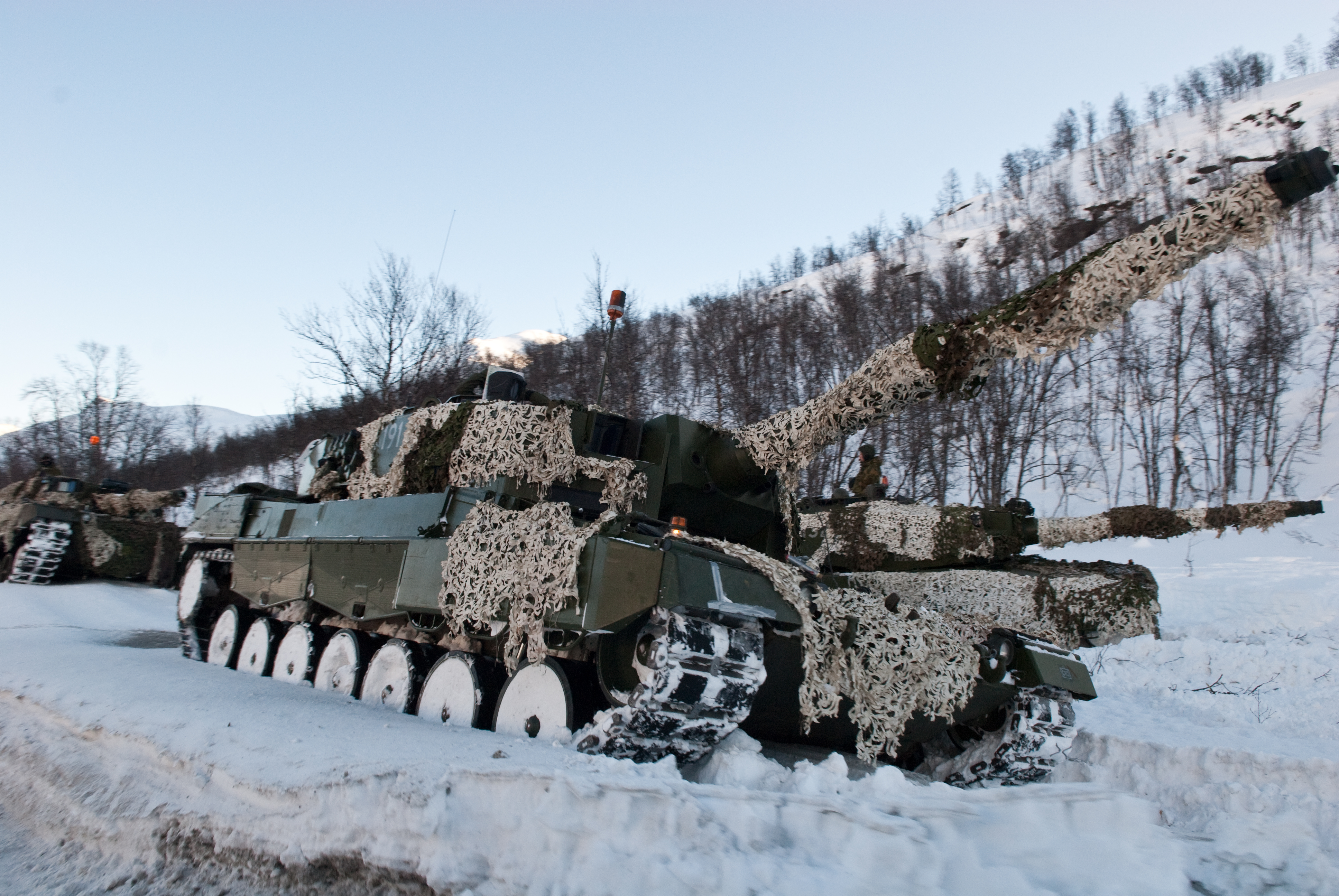 Norske Leopard 2-stridsvogner står i formasjon langs E6.